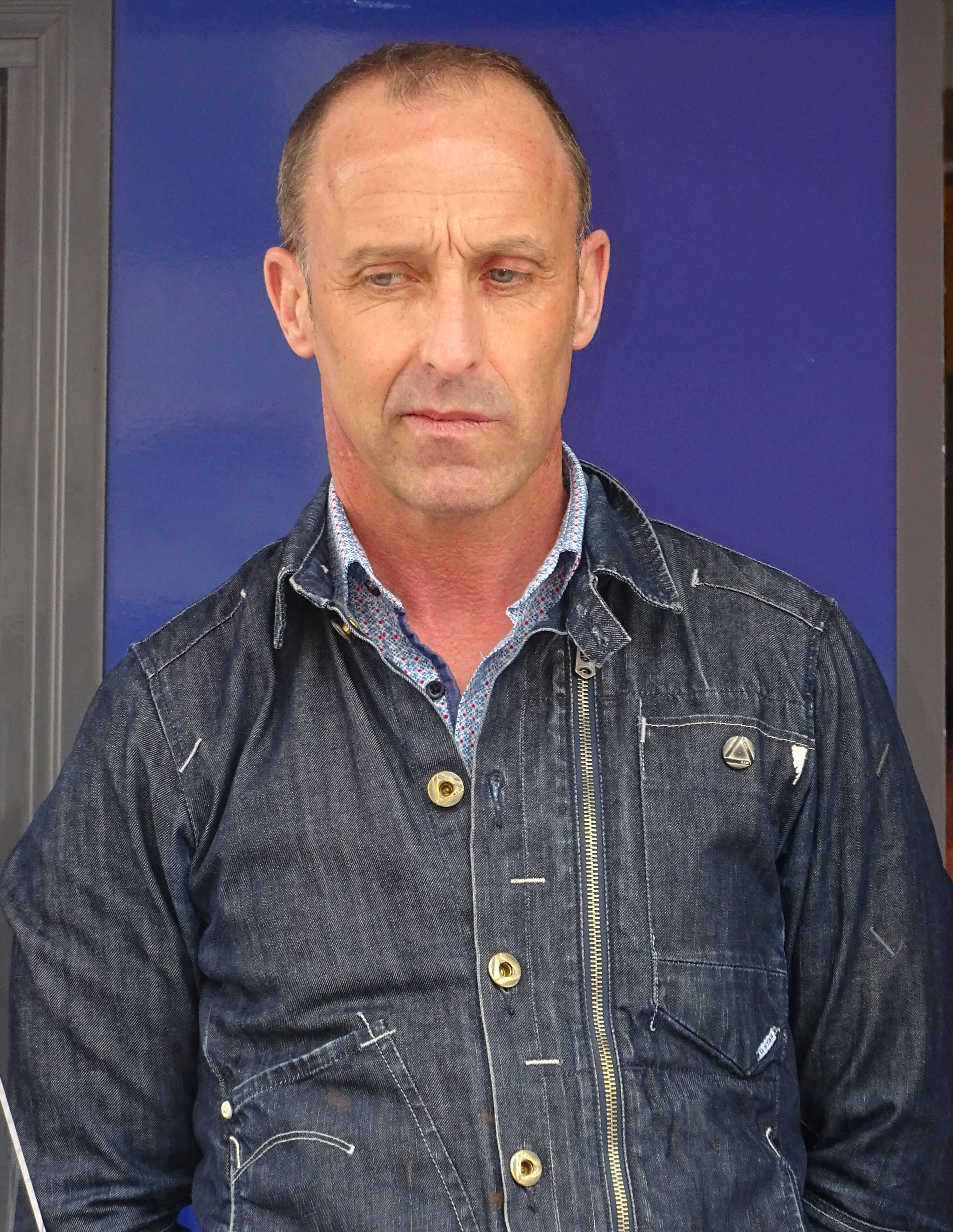 Reportage réalisé le vendredi 20 mai 2016 à l'occasion du départ de la première étape du Paris-Arras Tour 2016 à Douchy-les-Mines, Nord, Nord-Pas-de-Calais-Picardie, France. Depicted person: Luc Leblanc